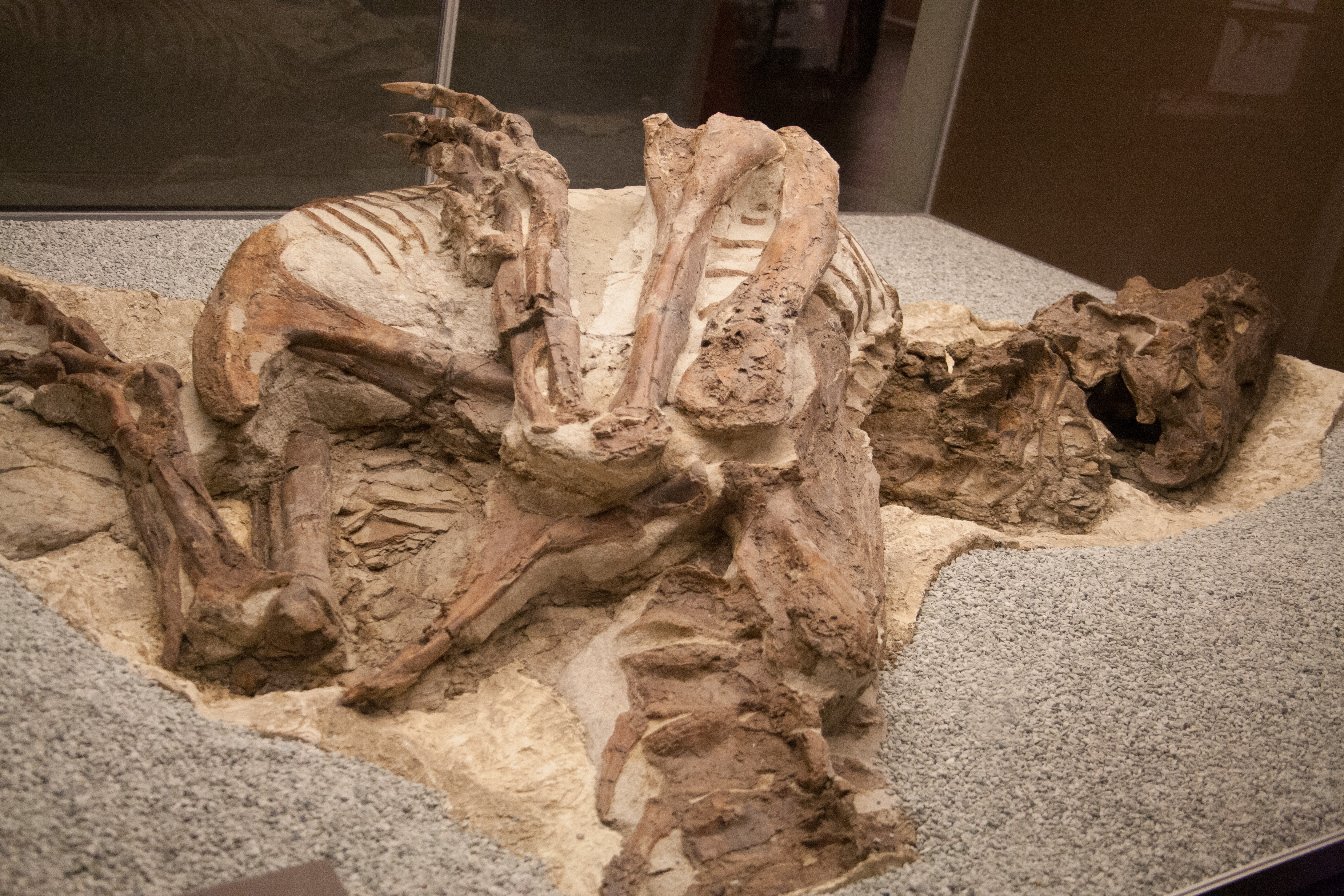 Gorgosaurus libratus